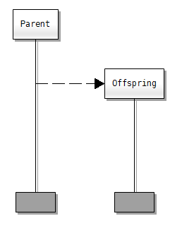 Dynamic process creation in an MSC